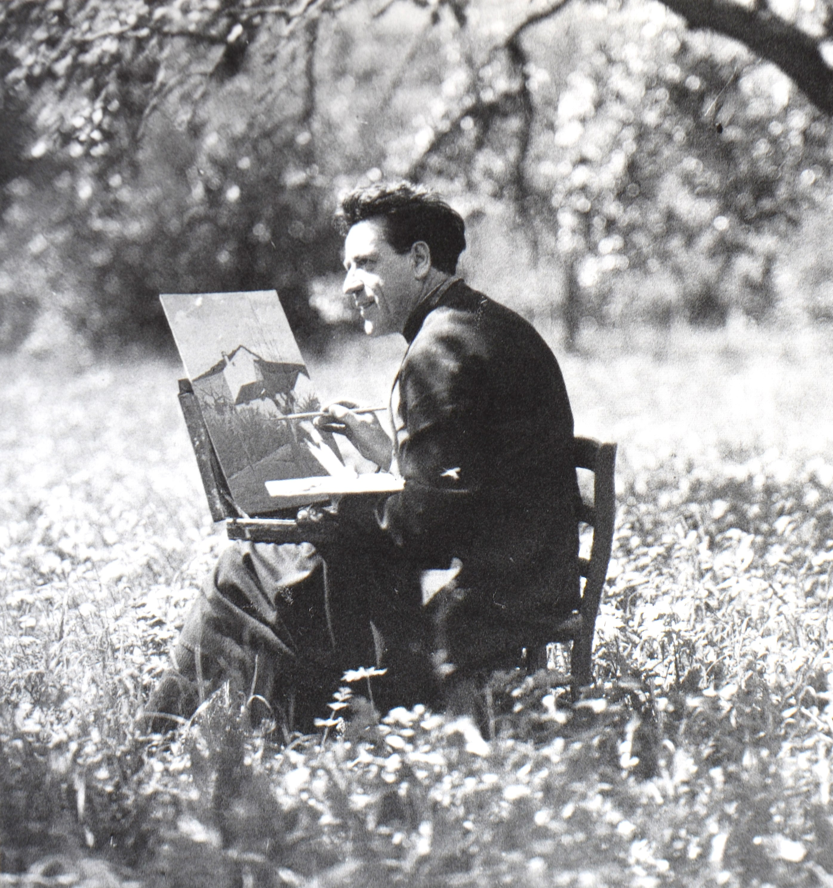 Foto del pittore Angelo Rescalli